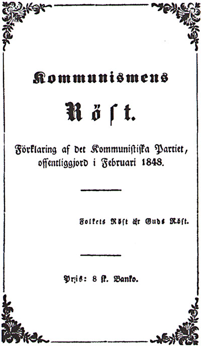 Kommunistiska manifestet. Sv. övers. 1848. Titelblad